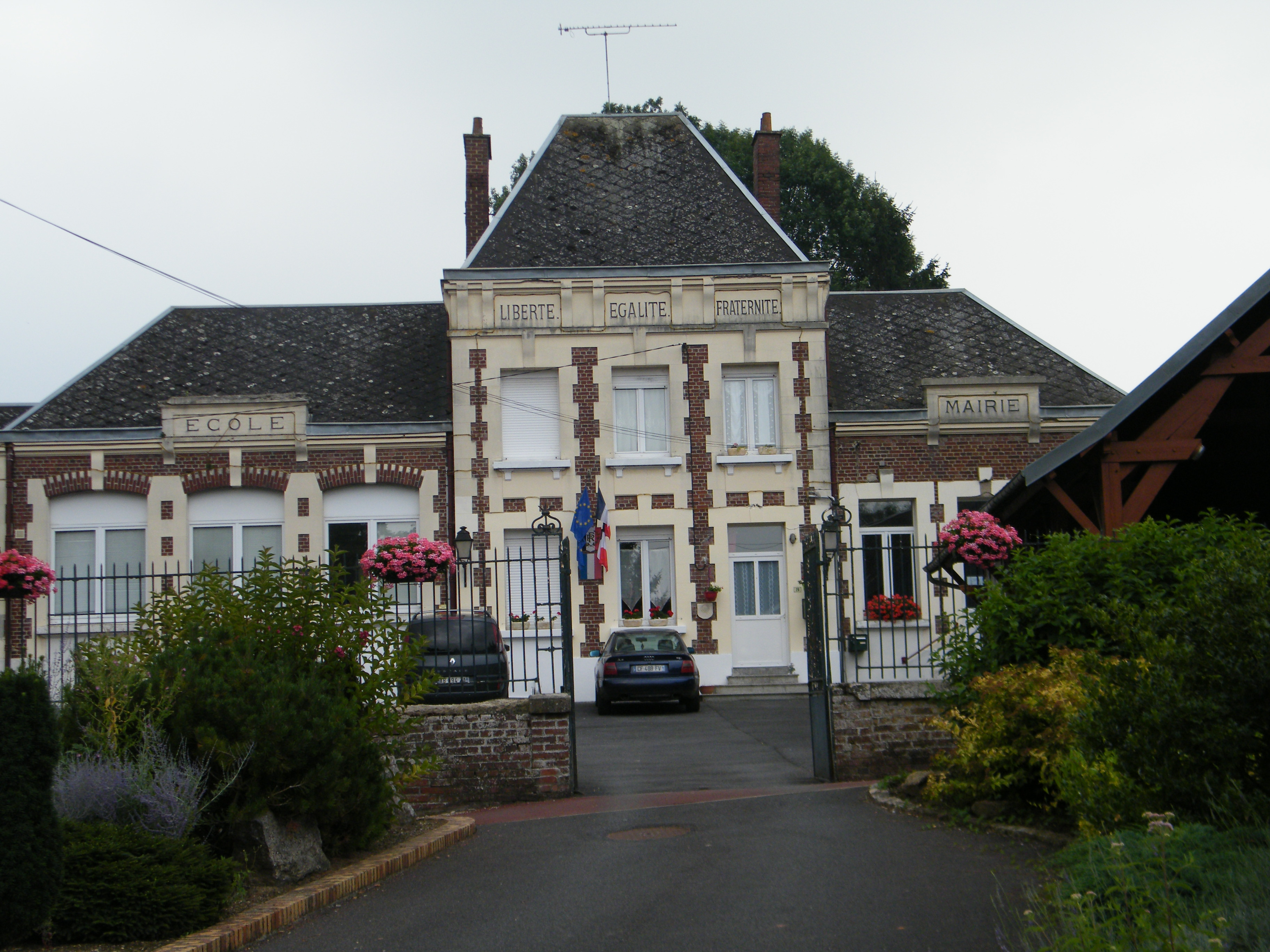 Mairie.